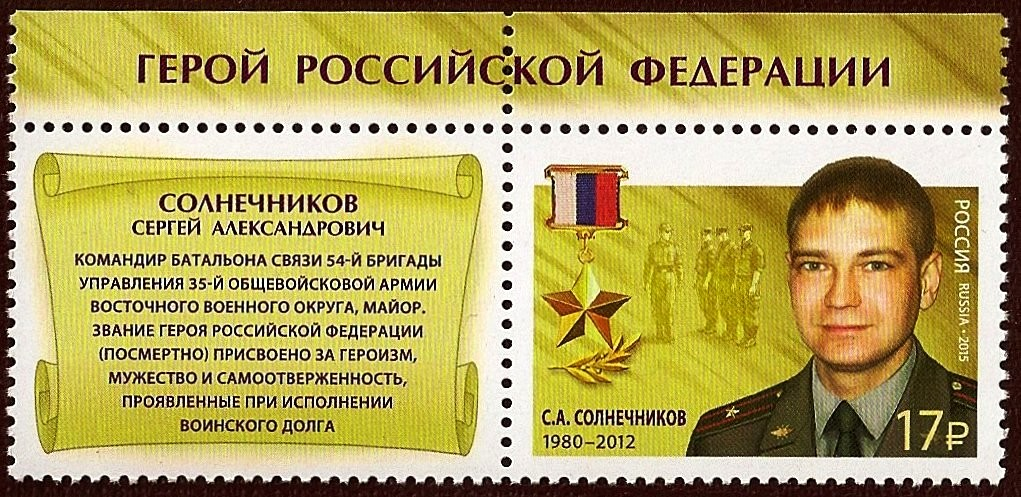 Почтовая марка России 2015 года. Герои РФ. Солнечников С.А.